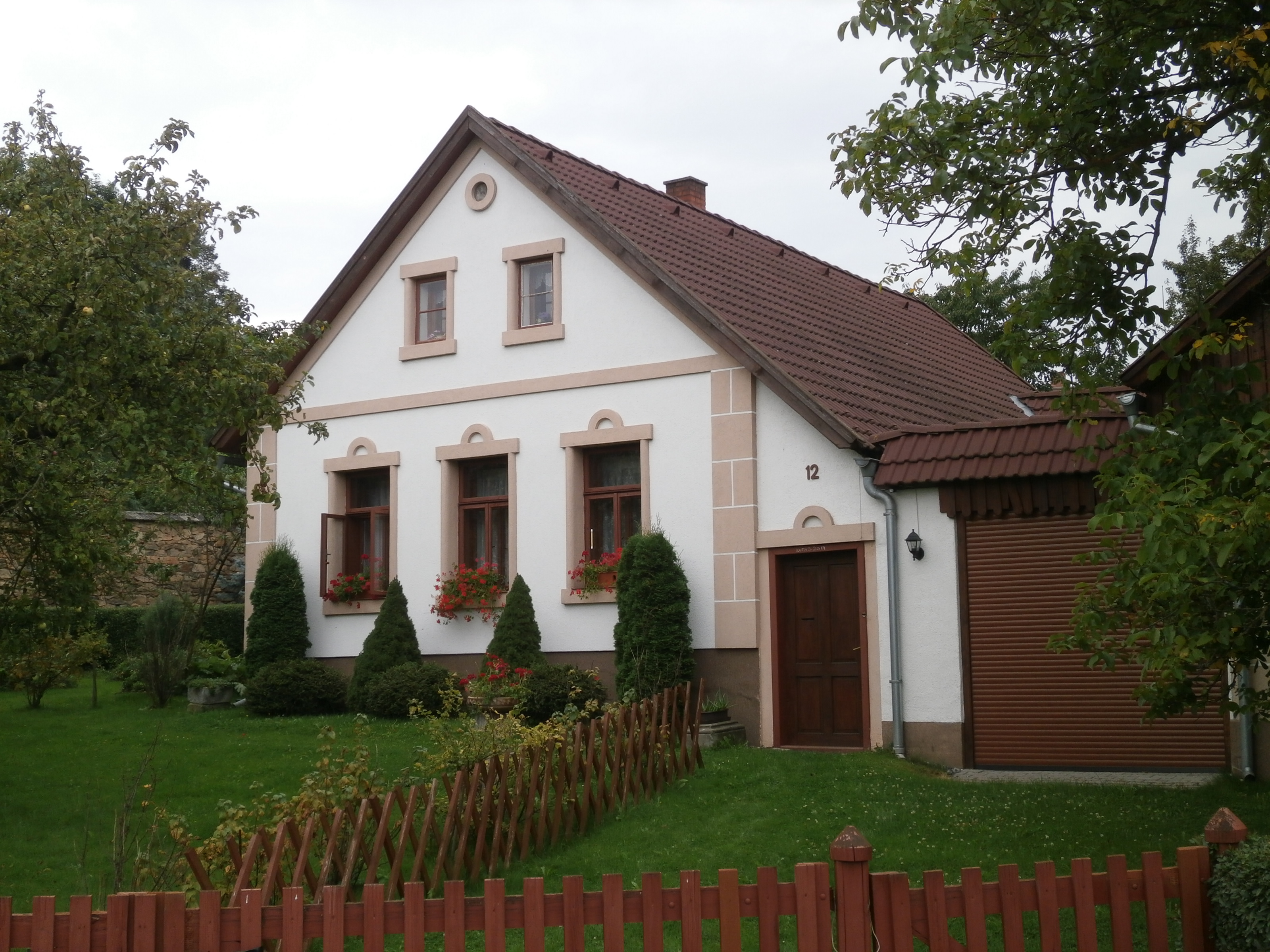 Záboří - č.p. 12